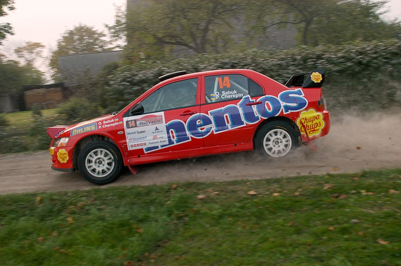 Экипаж Александра Салюка и Павла Черепина на дистанции ралли "Сааремаа", Эстония, 2010 год